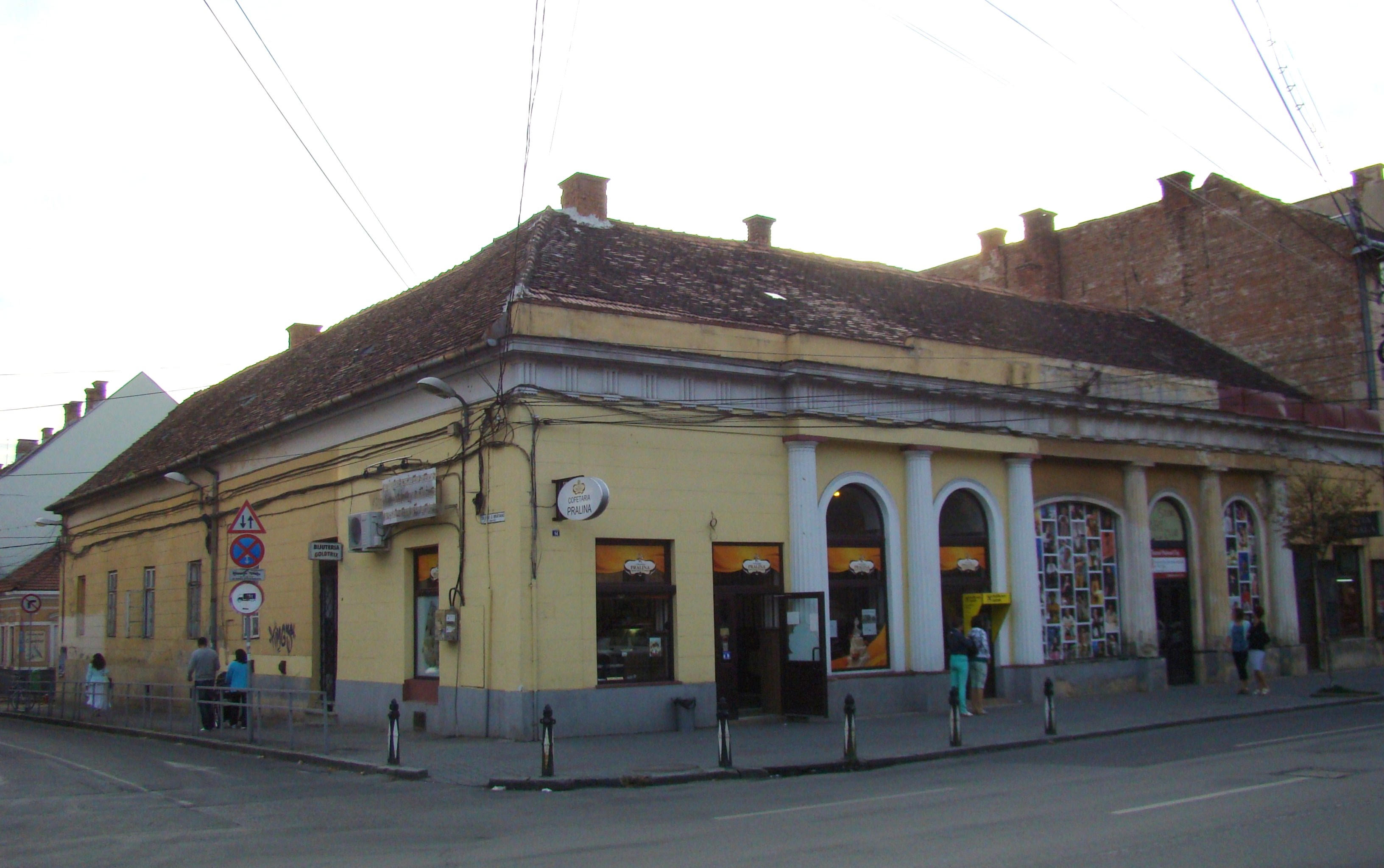 Clădire monument istoric, Piața Ștefan cel Mare 14